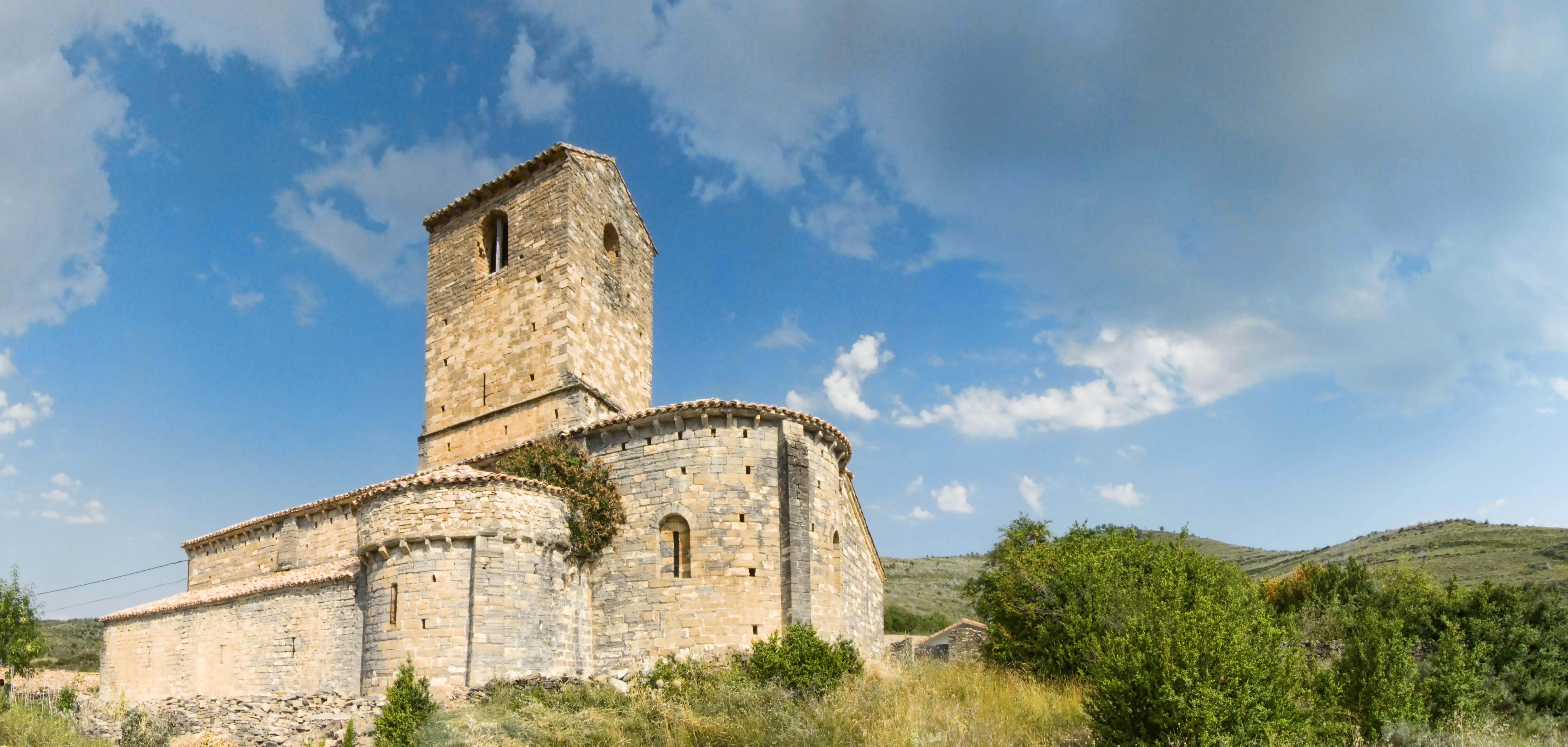 iglesia románica de Majones